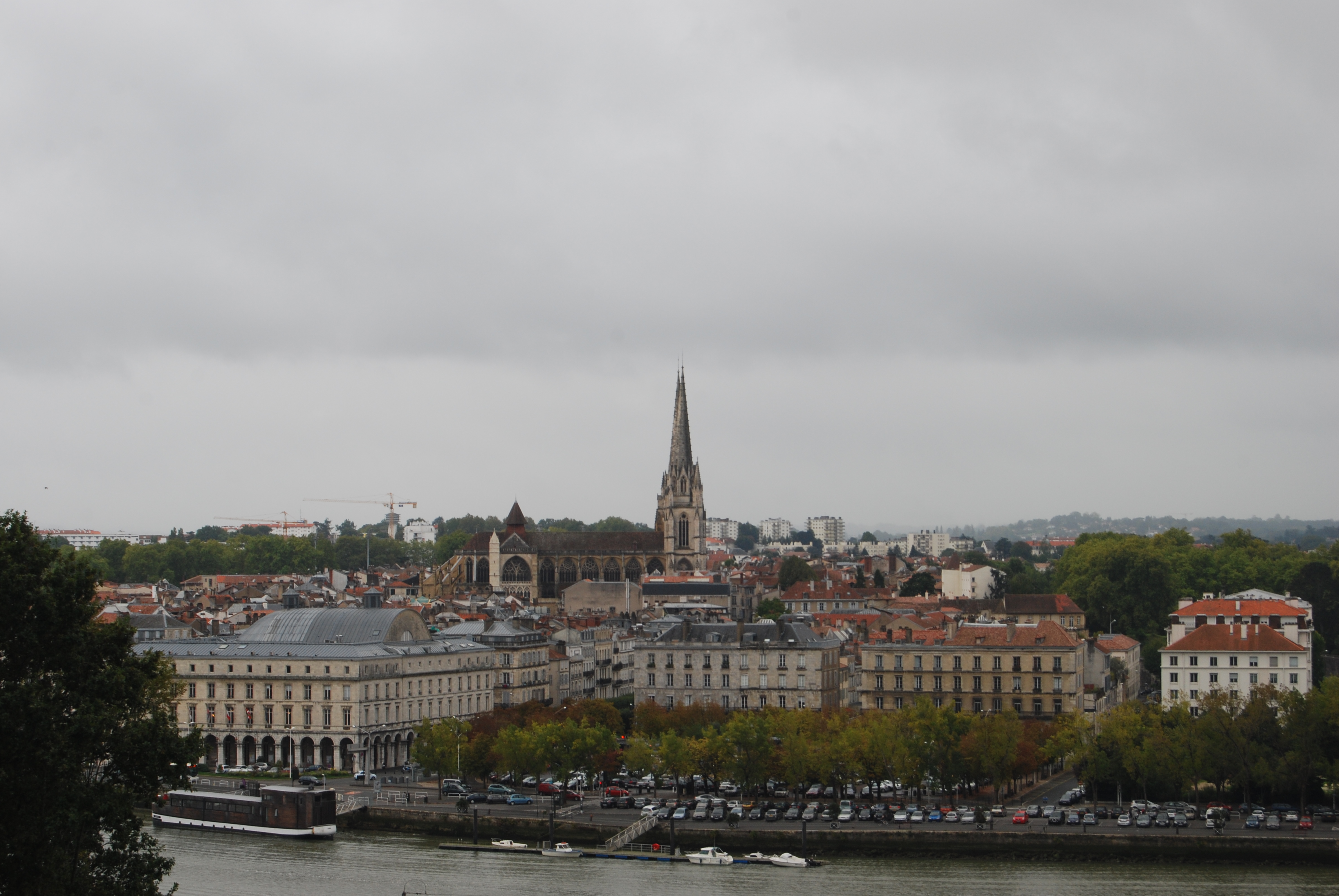 Vue générale de Bayonne, dont la cathédrale, depuis la citadelle.